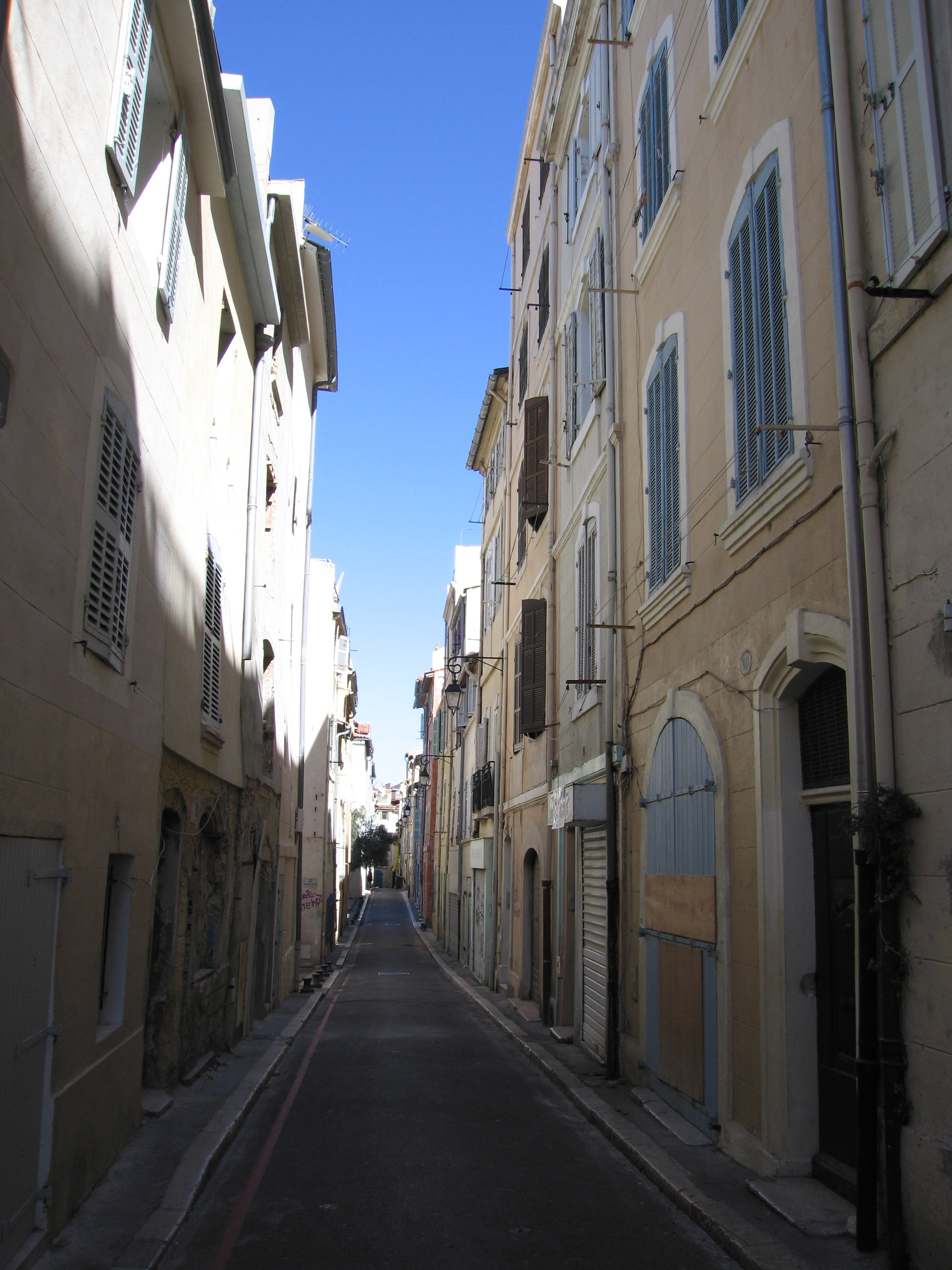 Une rue du quartier du Panier, à Marseille (France)